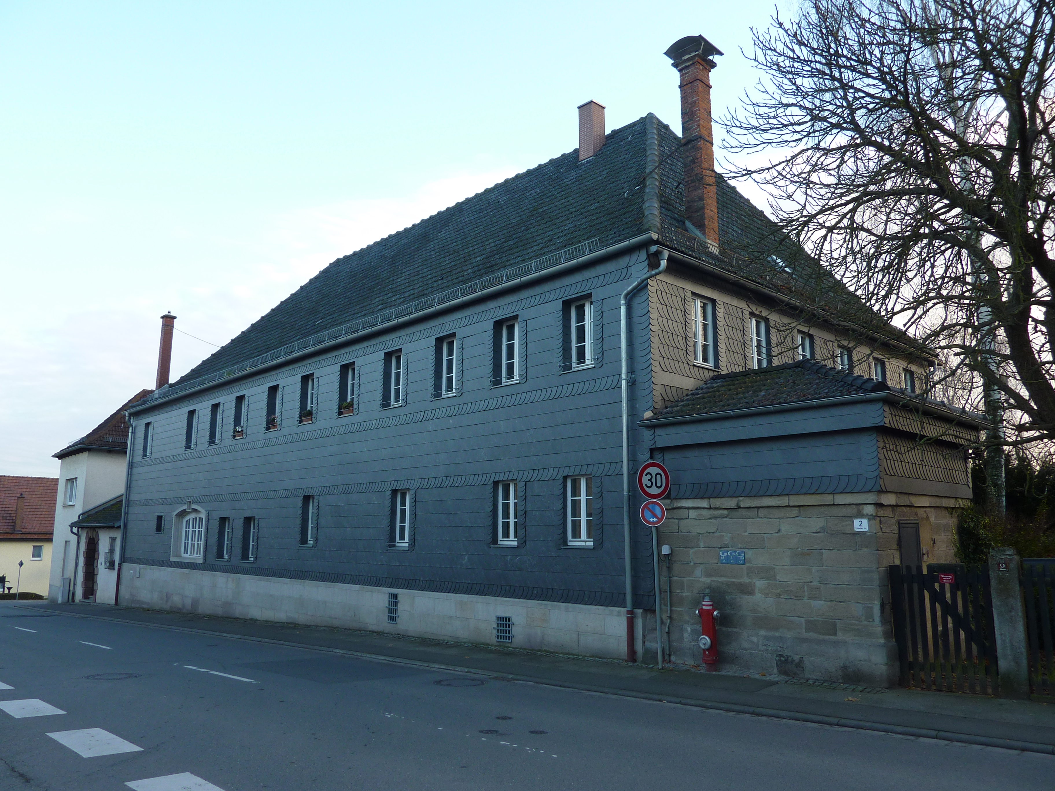 Bertelsdorf, Esbacher Straße 2; ehemaliges Rittergut Ehrlicher